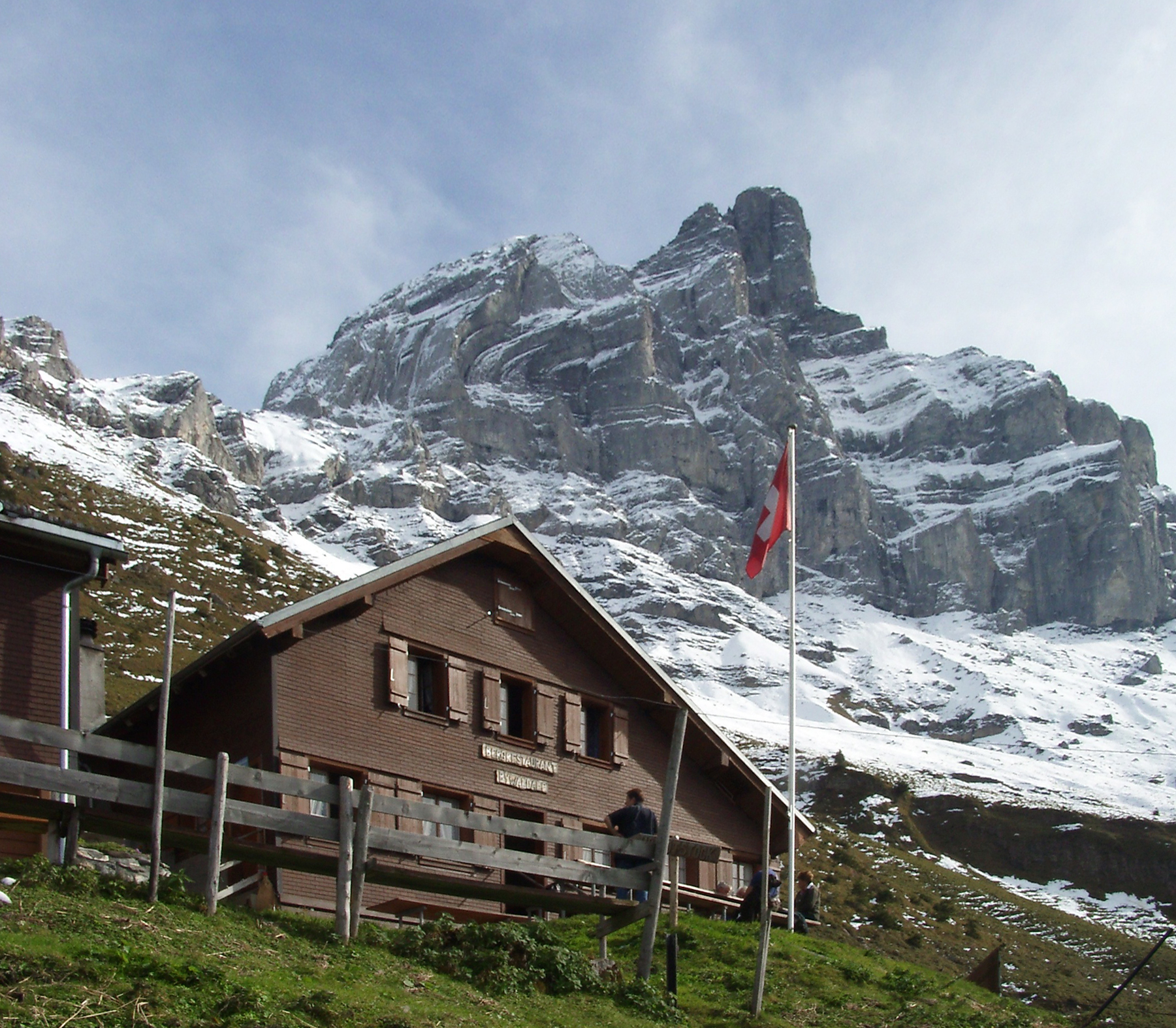 Berggasthof Biwaldalp am Wanderweg bzw. Bergwanderweg, der von der Ortschaft Isenthal durch das Isental auf den Urirotstock führt; Kanton Uri/Zentralschweiz